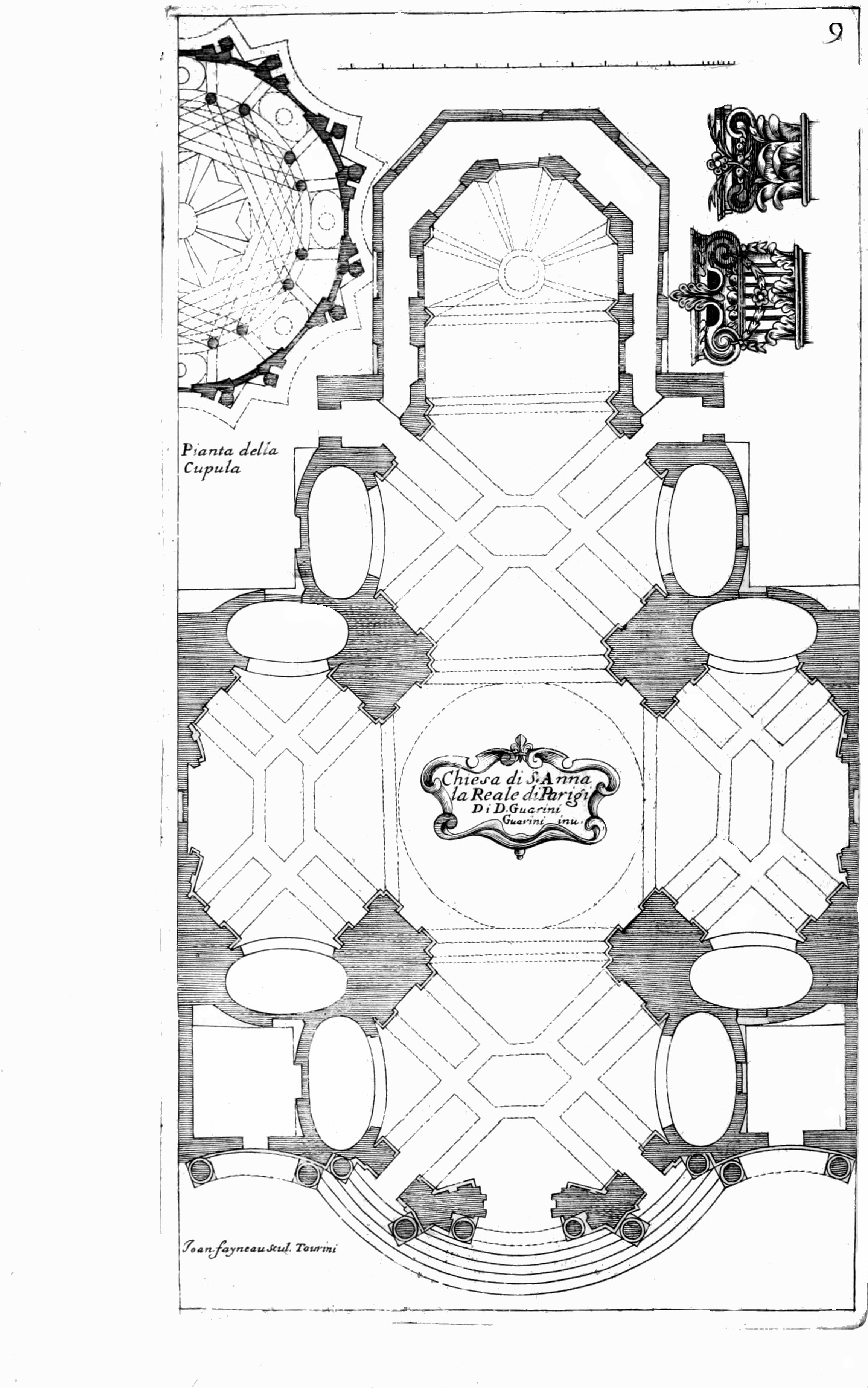 Chiesa di Sant'Anna la Reale di Parigi